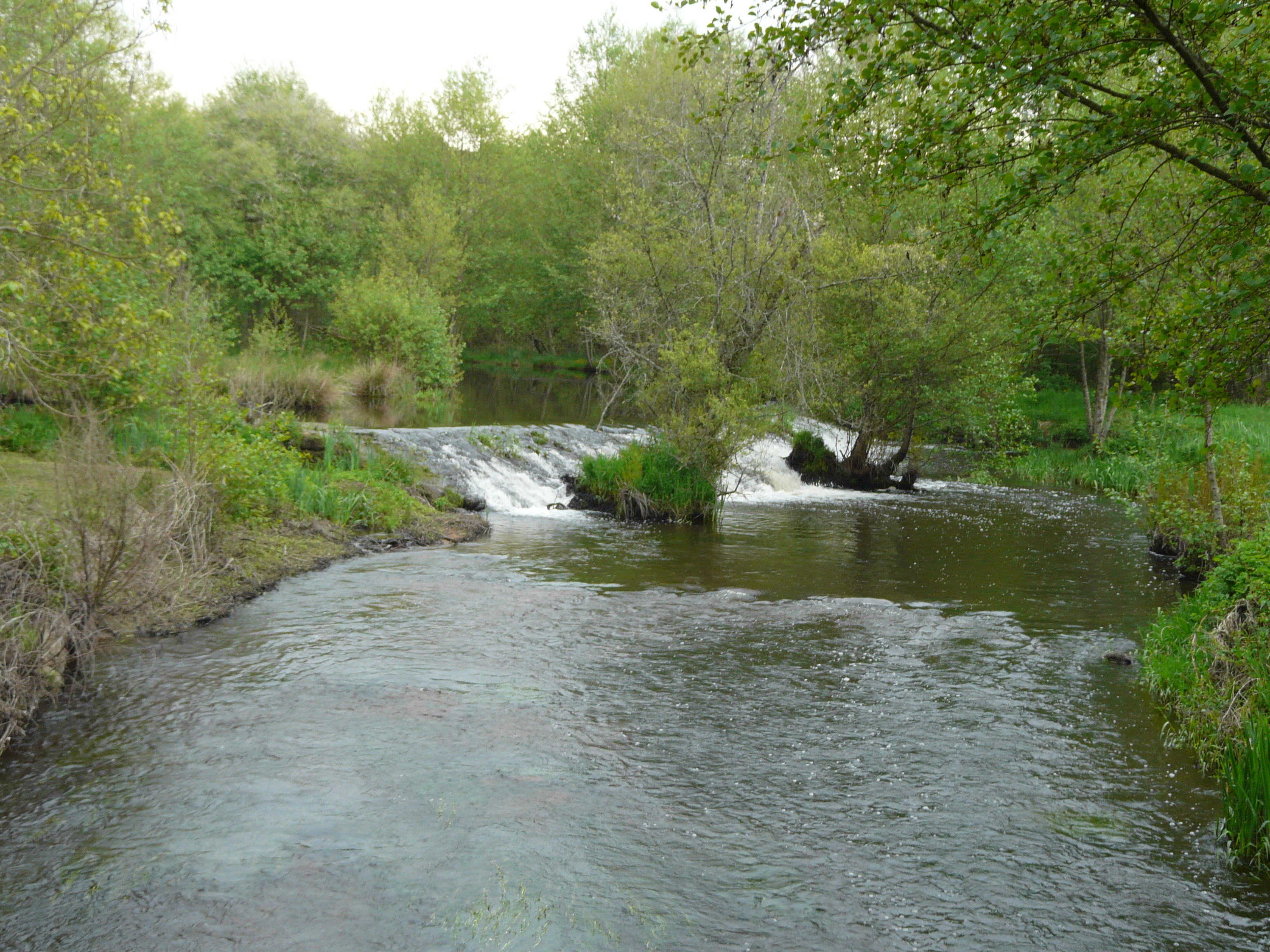 Le Bandiat, au moulin de Chez Pey, marque la limite entre Augignac (à gauche) et Abjat-sur-Bandiat (à droite), Dordogne, France. Vue prise en direction de l'amont.